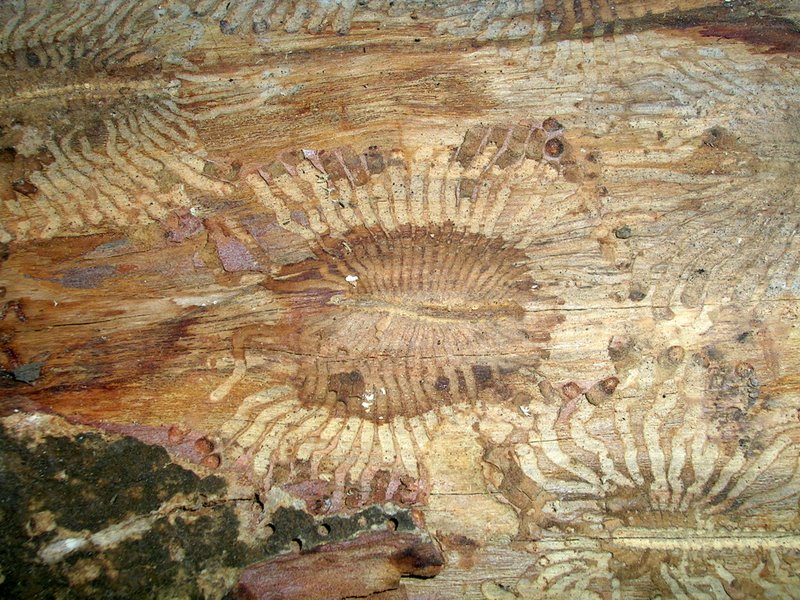 Bark beetle galleries from Dandeli, India